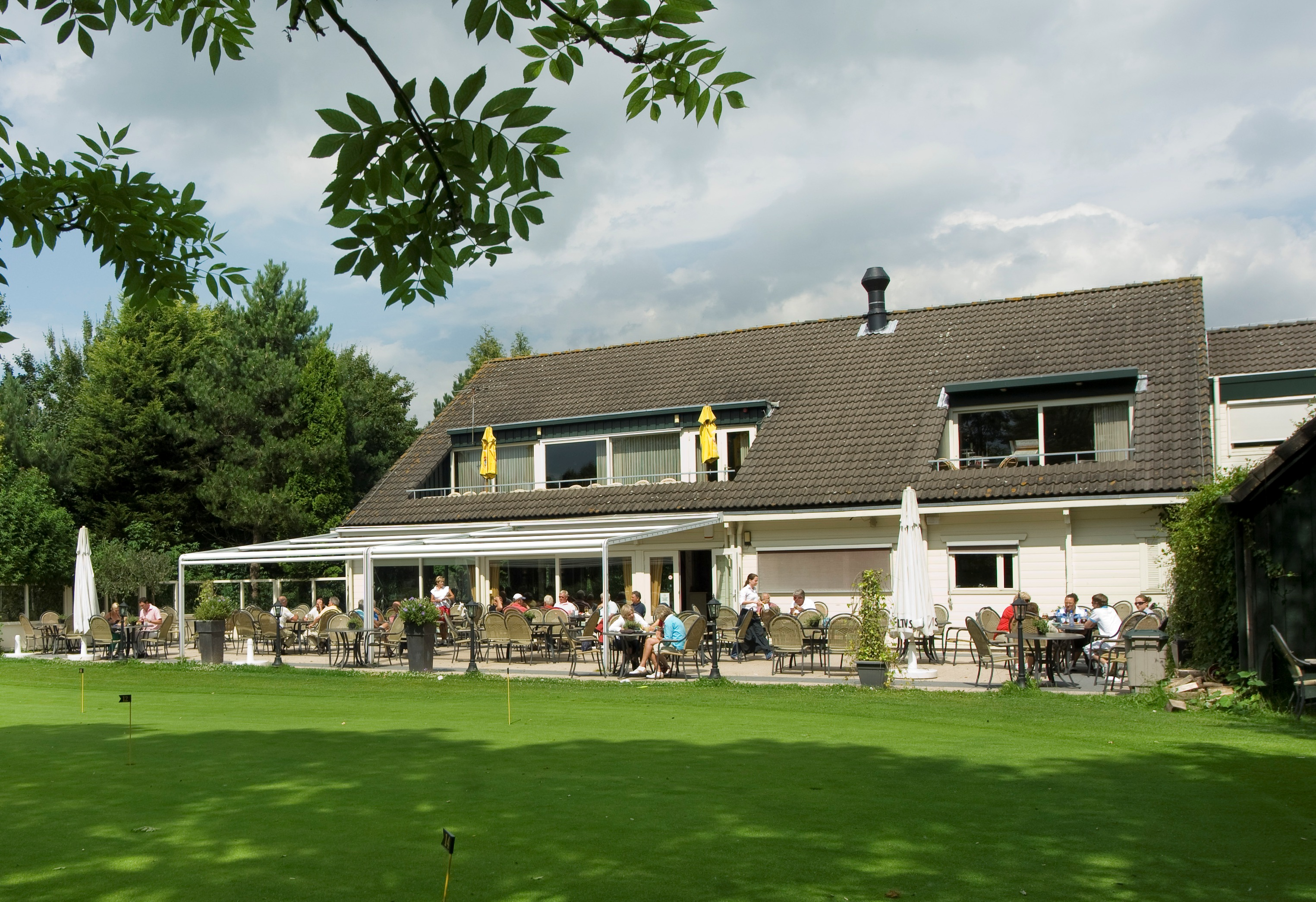 Foto van het clubhuis van Golfclub Zeegersloot, Juli 2009